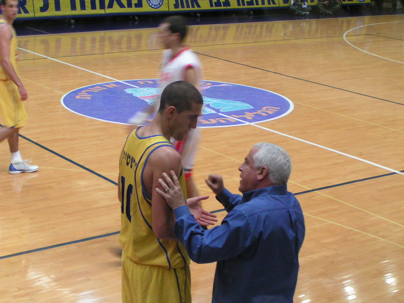 טל בורשטיין ופיני גרשון, משחק בגליל